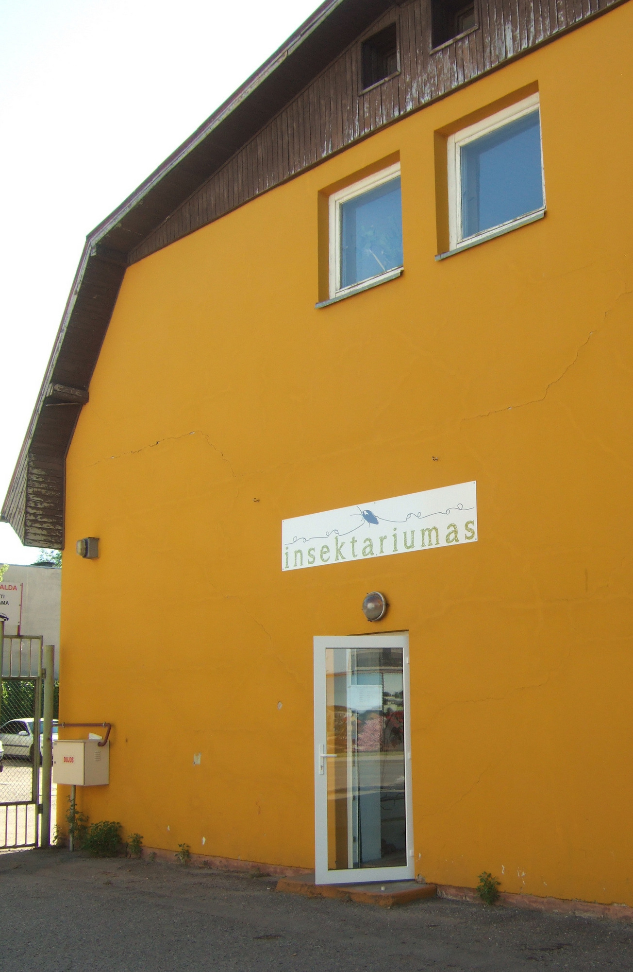 Palangos insektariumas